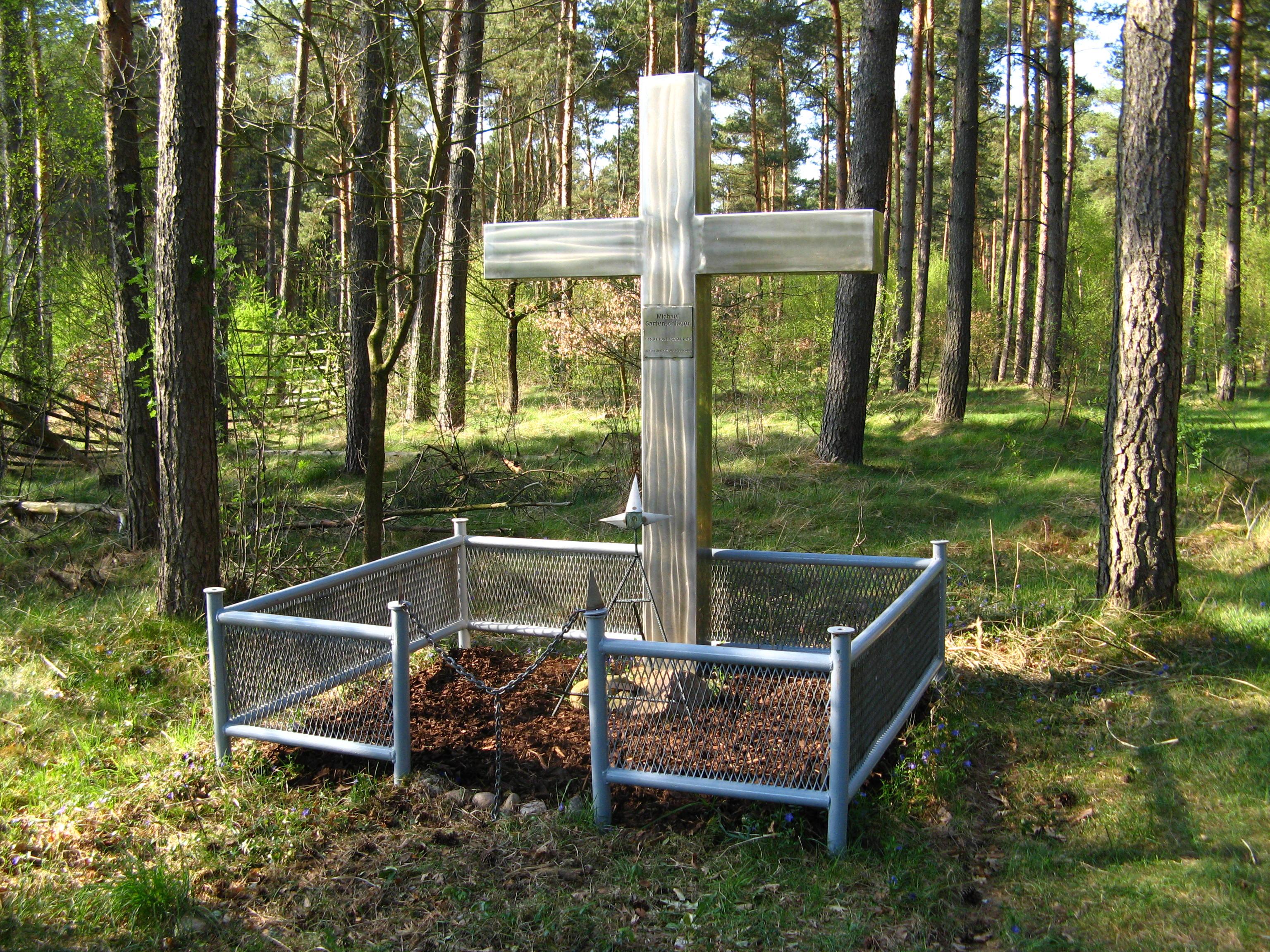 Gedenkkreuz am Todesort Michael Gartenschlägers, ehemalige Staatsgrenze DDR - BRD